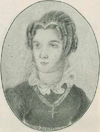 М.Д. Львова-Синецкая (1795 - 1875) - русская актриса